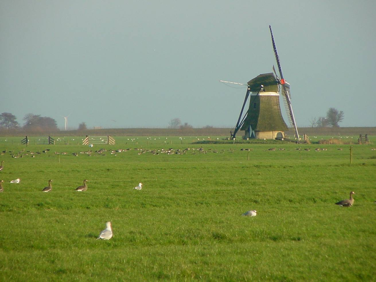 Dit is de mûne 't Swaantsje, sa't dy der sûnt de restauraasje fan 1987 útsjocht. It plúmpke boppe de eachein, fan lofts ôf likernôch op in tredde fan de foto, is it Woudagemaal, dat dy dei yn bedriuw wie.